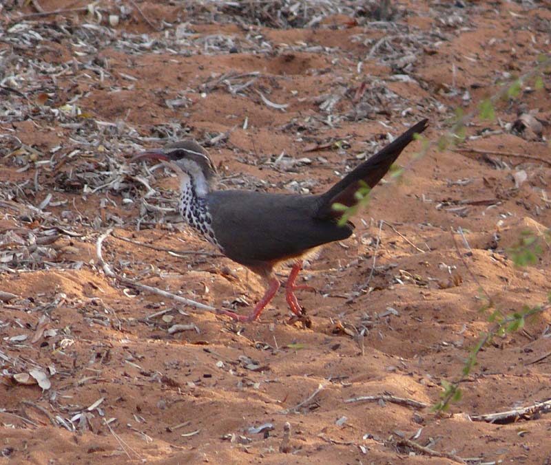 Male Subdesert Mesite Monias benschi, Reniala Botanical Gardens nr Ifaty, SW Madagascar